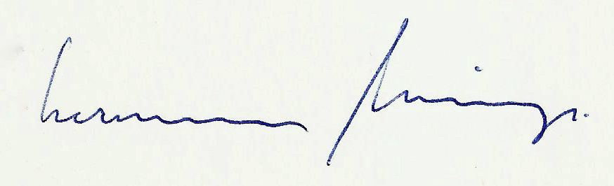 Signatur seines handgeschriebenen Briefes an mich vom 21.12.1995